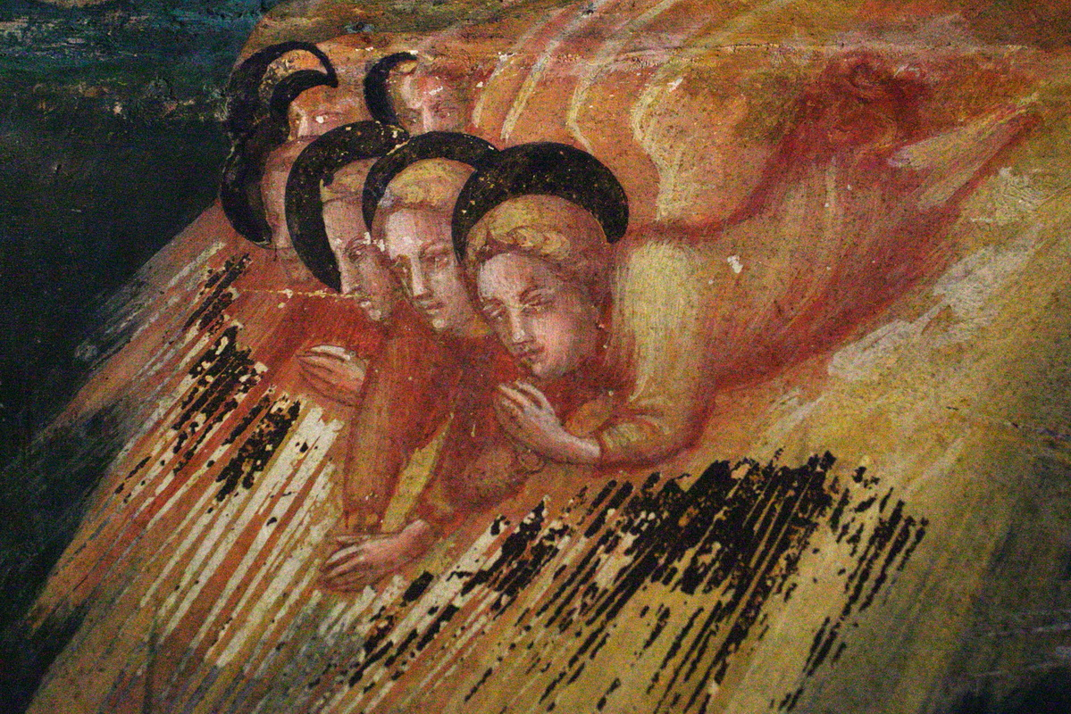 Naixement de Jesús. Detall dels àngels sobre uns raigs de llums que originalment tenien pa d'or.